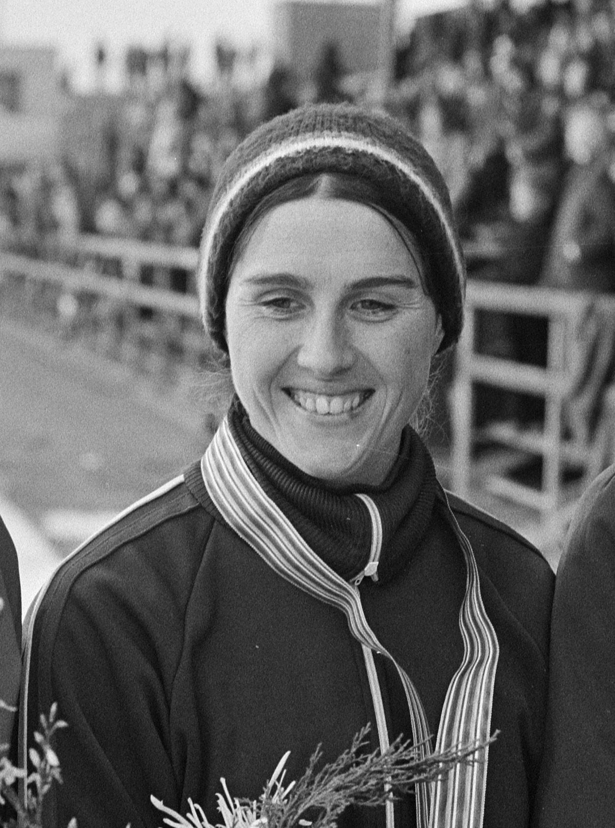 Sheila Young